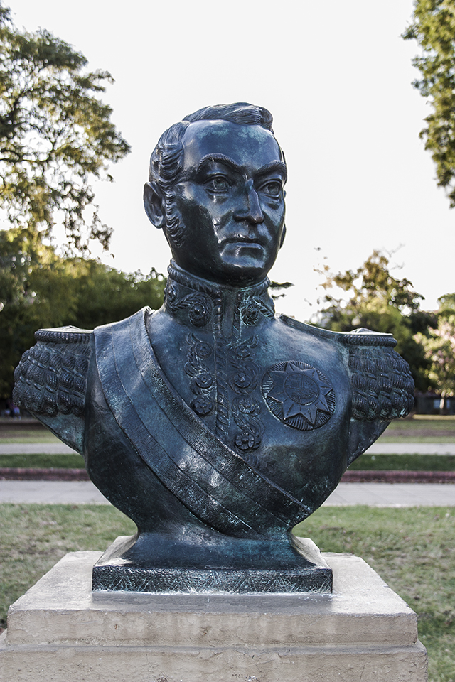 Estatua del General Don José de San Martin, Parque Chacabuco. Buenos Aires, Argentina.